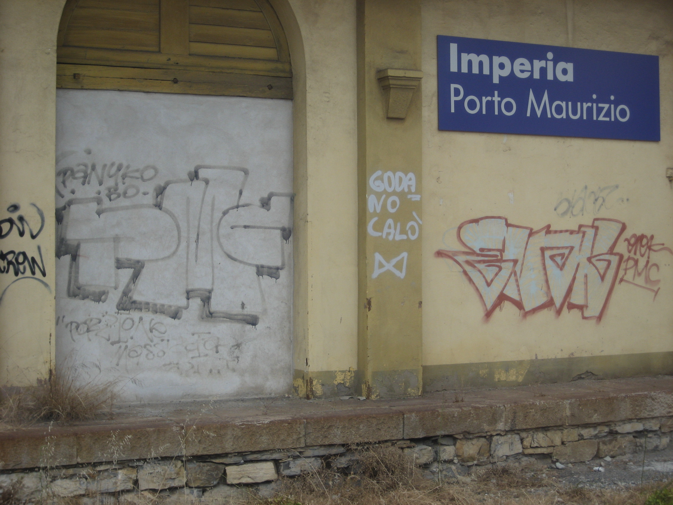 Particolare del magazzino merci della stazione di Imperia Porto Maurizio